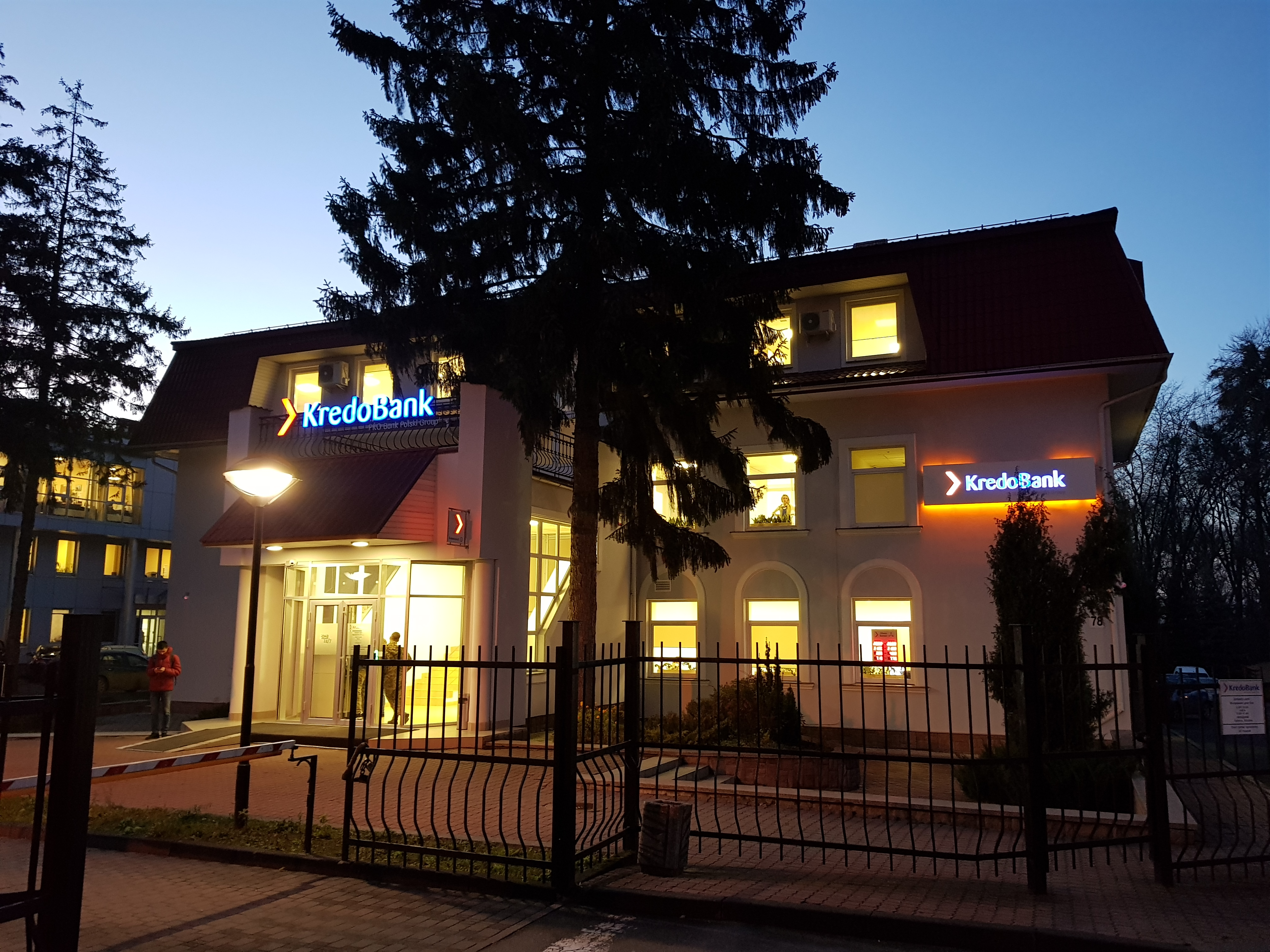 Відділення вул. Сахарова, 78 ПАТ "Кредобанк" у Львові